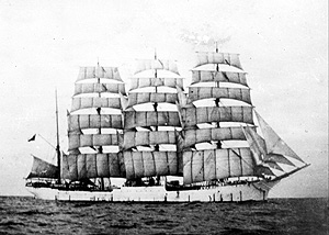 Fragata Lautaro donada a Chile por el Gobierno de Alemania el 23 de mayo de 1941.